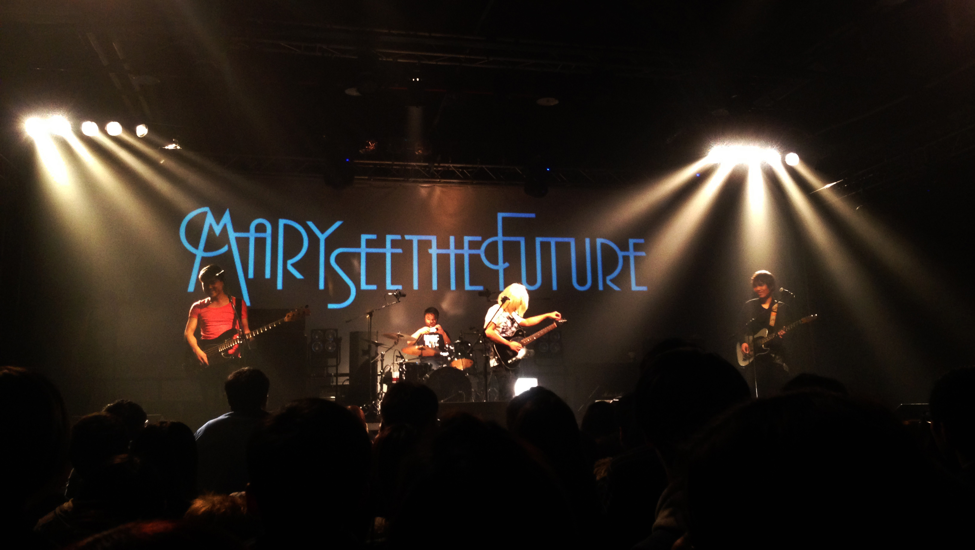 中文（台灣）: 20140308 Legacy Taipei